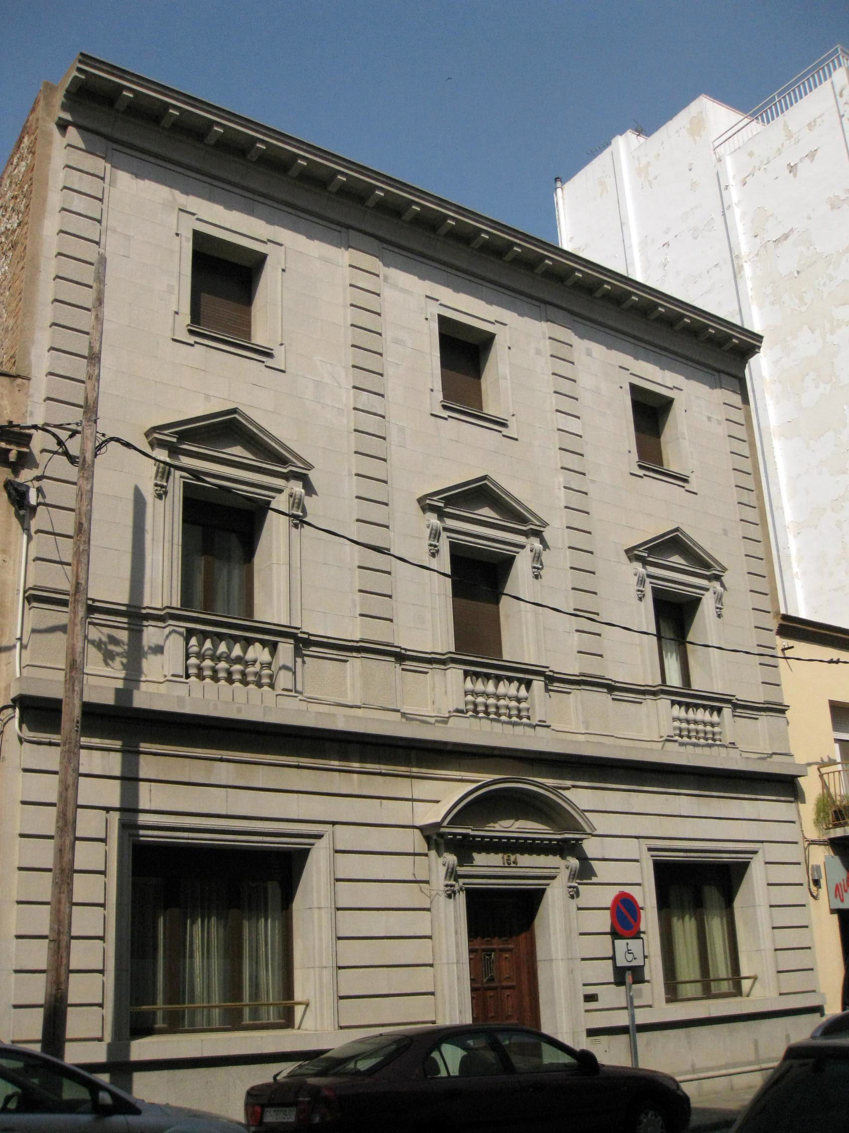 Habitatge al carrer Nou, 154 (Figueres)